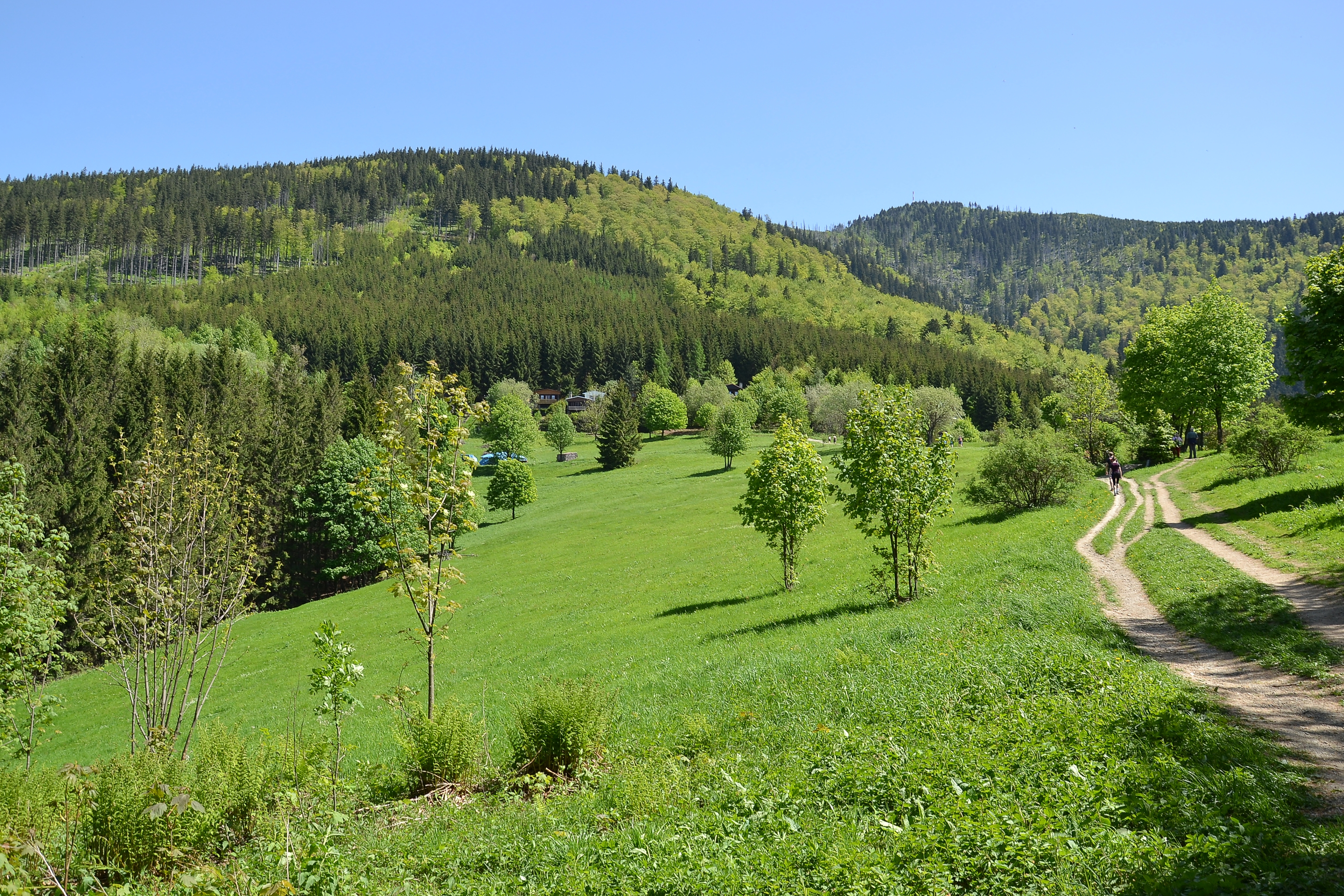 Butořanka, Moravskoslezské Beskydy